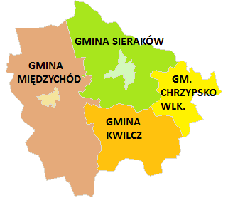 Gminy powiatu międzychodzkiego